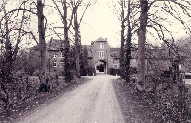 Borgloon Fonteinhof 1-2